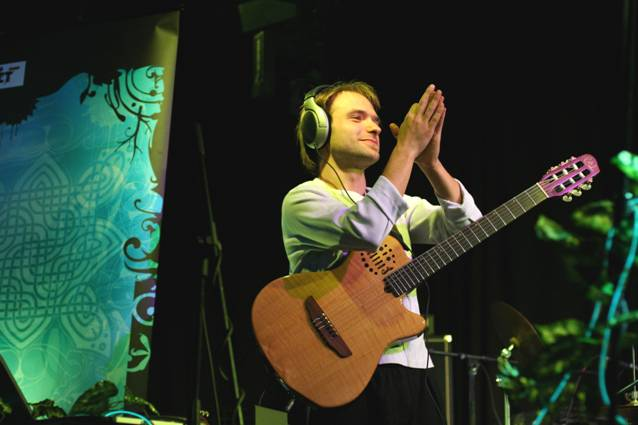 Олег Смирнов, группа «EXIT project».